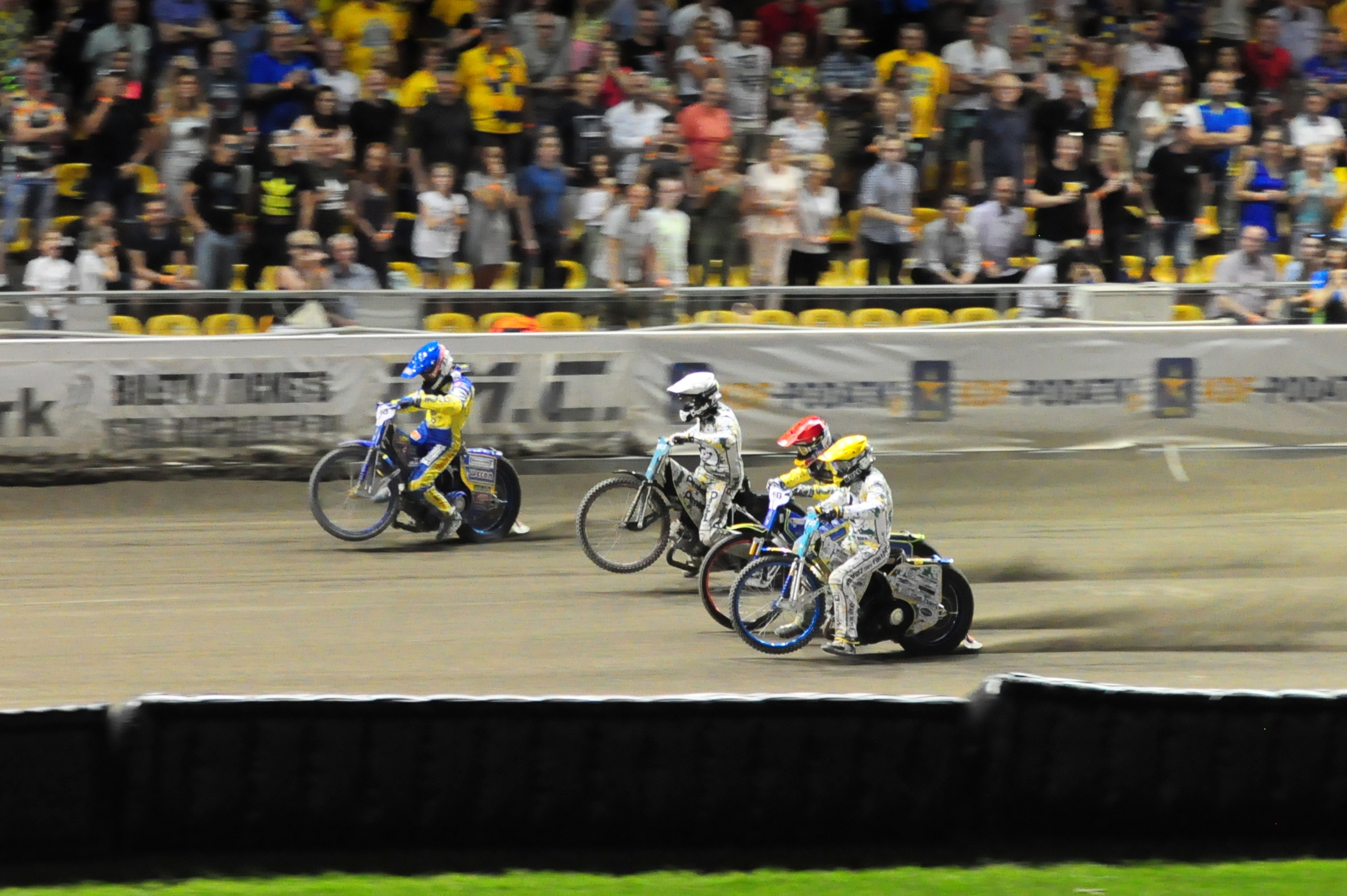 Gorzów Wlkp. - 28.05.2017 r. Derby Ziemi Lubuskiej nr 91, bieg 15 wygrany przez gorzowian, zakończył derby remisem 45:45. Zwycięstwo Bartosza Zmarzlika (kask niebieski) po znakomitym starcie oraz zdobycie przez Przemysława Pawlickiego (czerwony) 1 pkt, uratowały remis. Ten ostatni, decydujący bieg 14 500 widzów oglądało na stojąco. Na zdjęciu, tuż po starcie do 15 biegu - B. Zmarzlik (n), Piotr Protasiewicz (b), P. Pawlicki (cz) i Jason Doyle (ż).